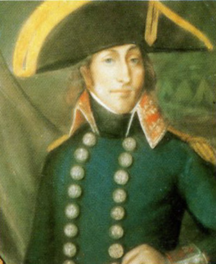 Portrait du général Jean-Baptiste-Camille de Canclaux (1740-1817)